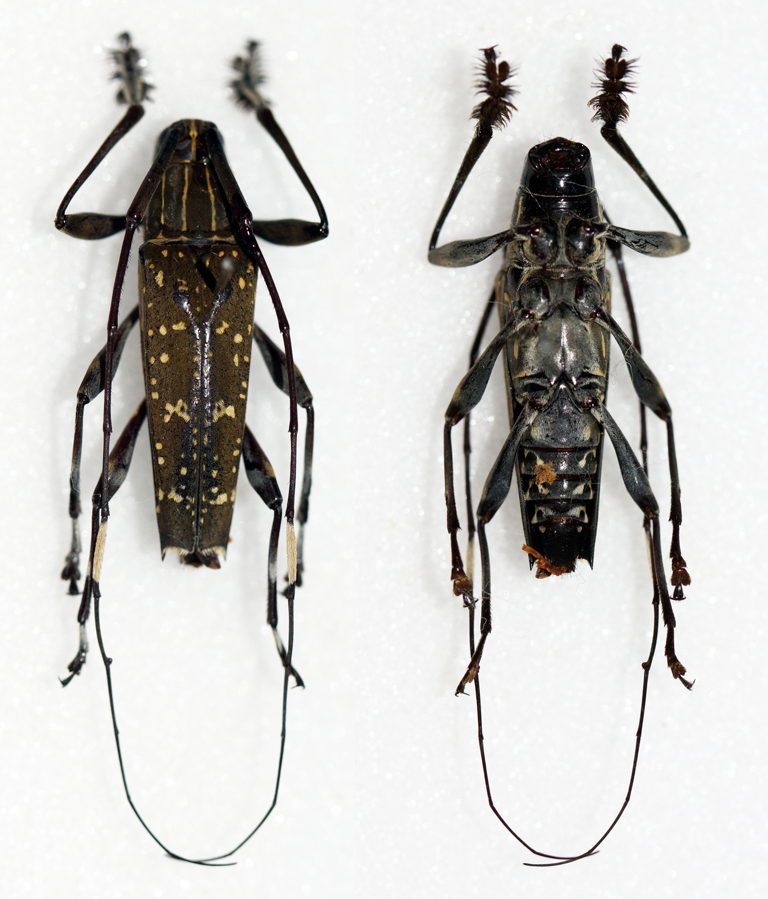 Latreille,1833 Sex: Male Data: 09-2012 - Rio Tampe - Junin - Satipo - Peru Size: 23mm